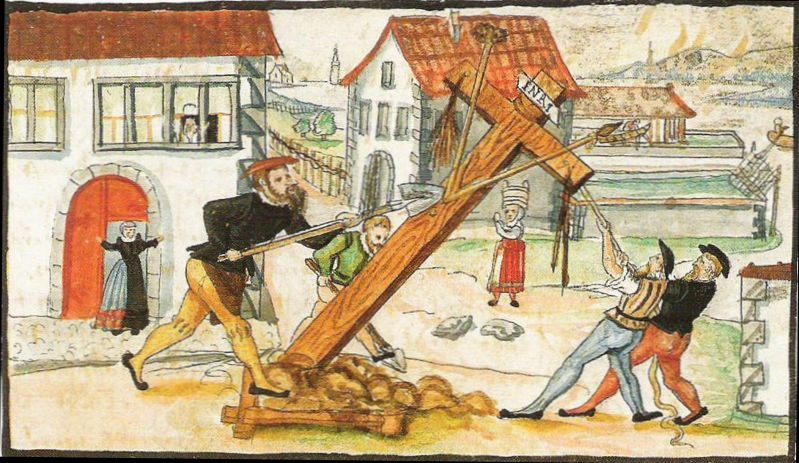 Klaus Hottinger stürzt 1523 ein Wegkreuz bei der Mühle Stadelhofen (Zürich)